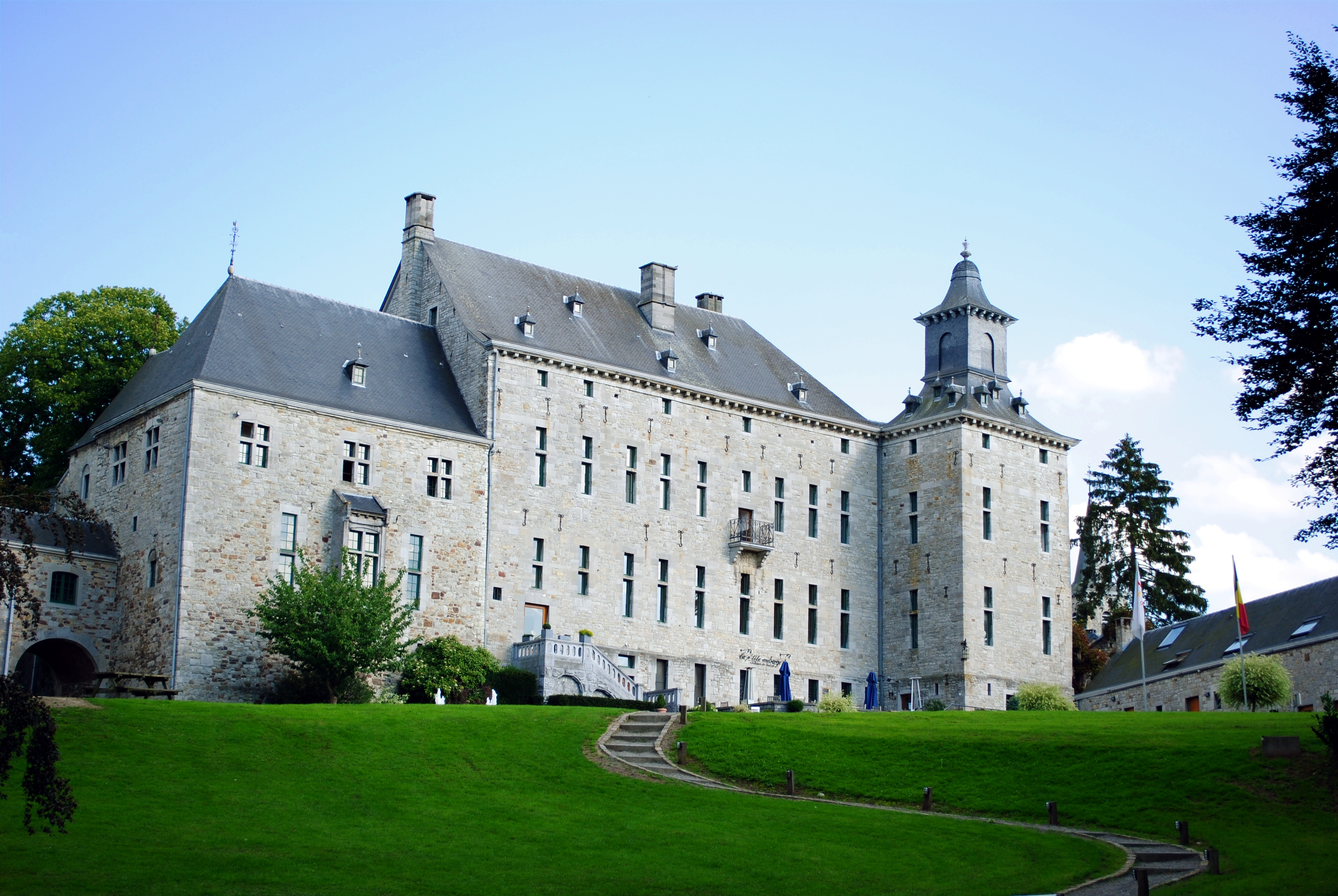 Château (XVIe - XVIIIe siècles) du petit village de Harzé (Aywaille). Transformé aujourd'hui en auberge, restaurant, salle de réception et accueil de séminaire. Il accueille également diverses événements tels que la fête du fromage au mois d'Août.